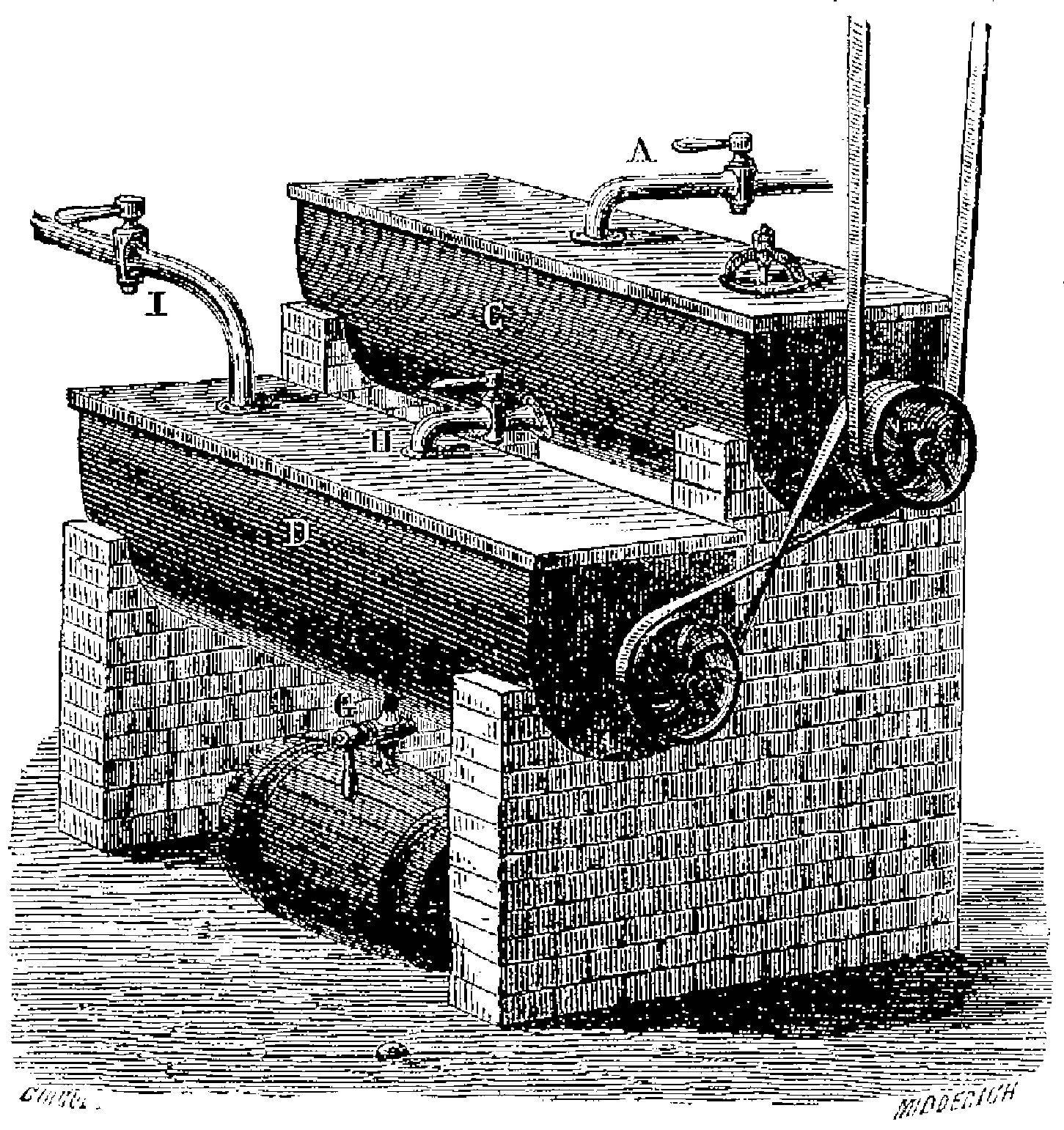 Appareil pour laver le pétrole à l’acide et à l’alcali